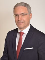 Dieter Steger, politico italiano